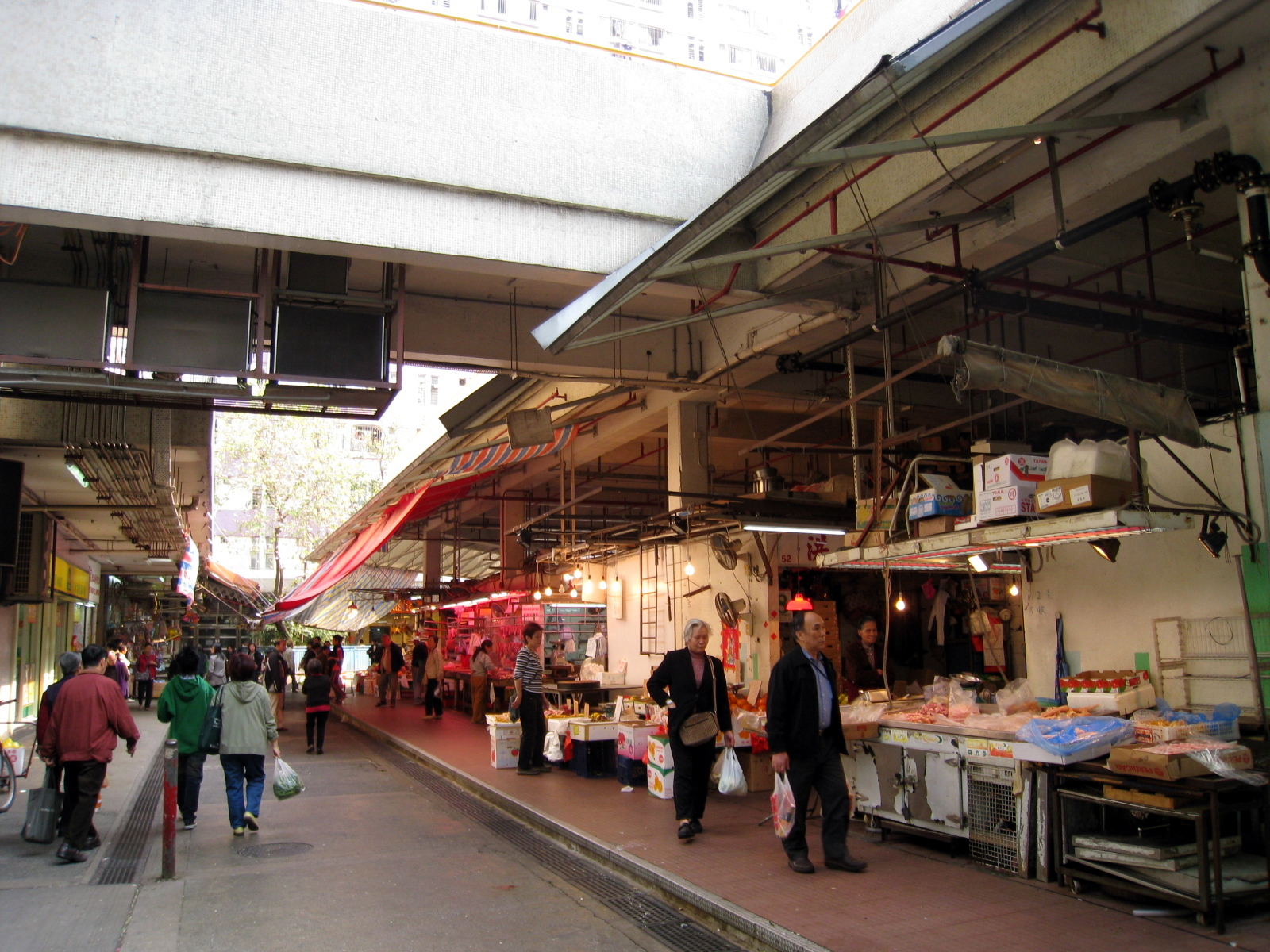 HK Pok Hong Market